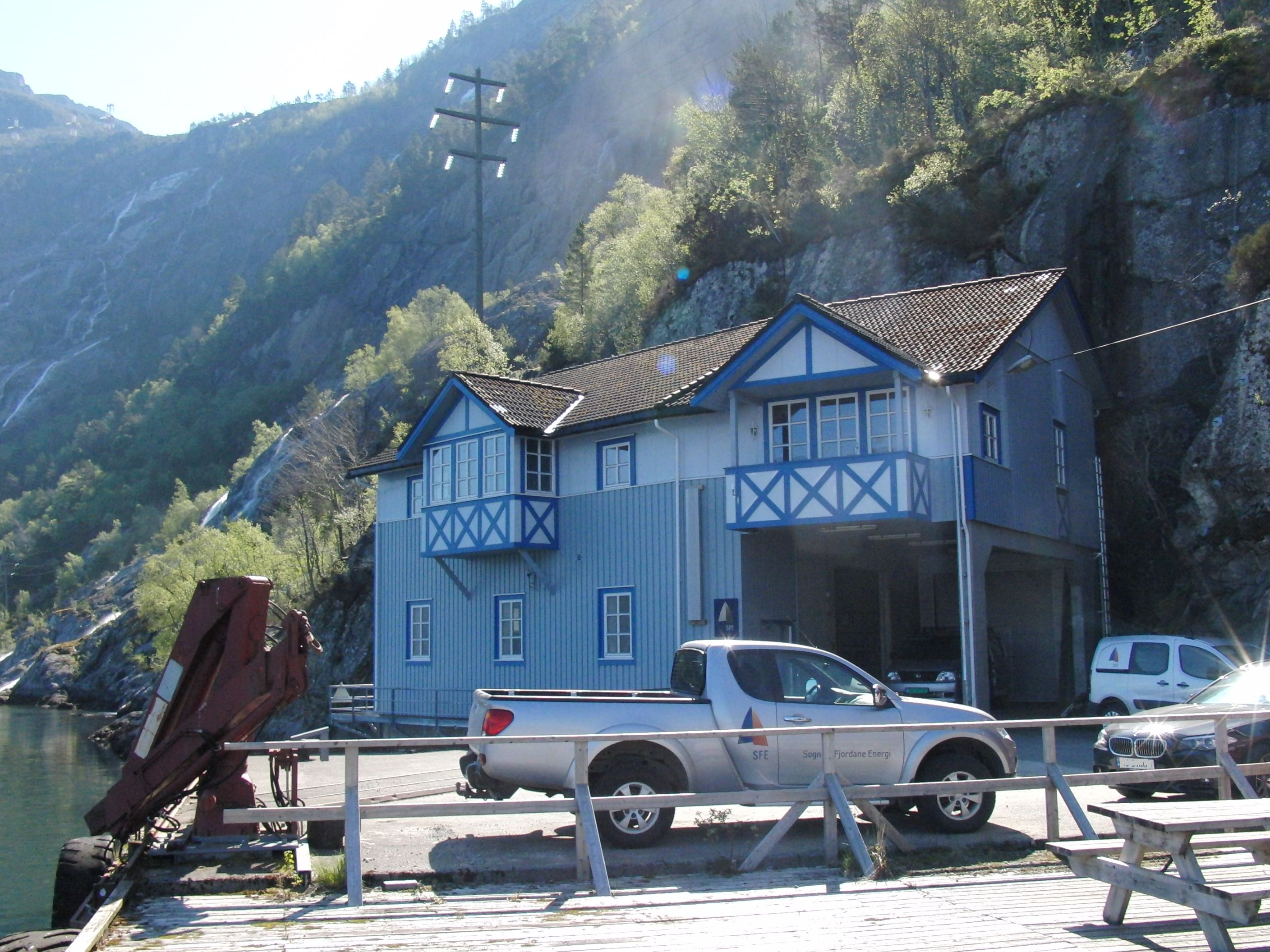 Øksenelvane kraftverk